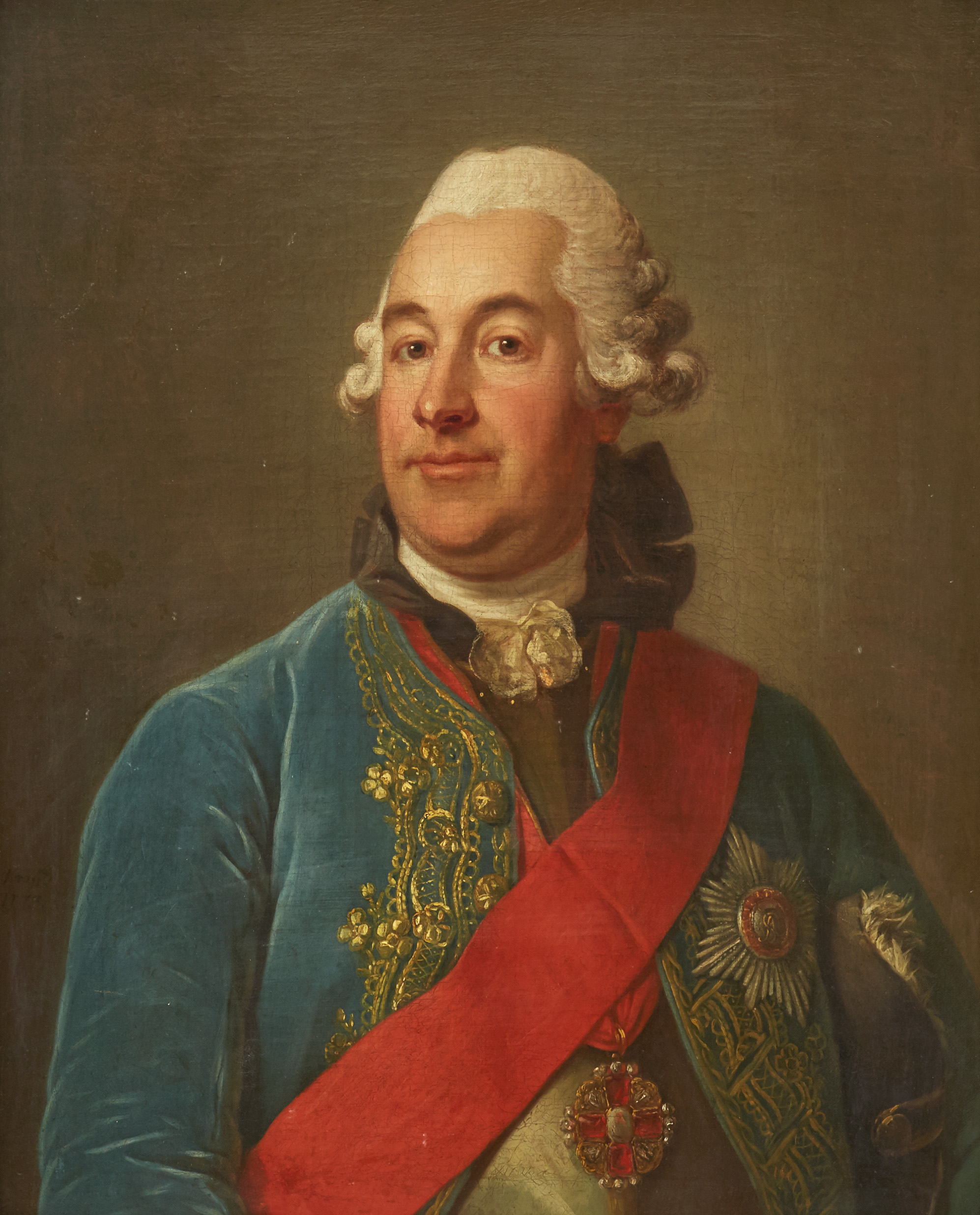 Ivan Osterman (1725‑1811) var rysk greve och diplomat. År 1760 utnämnd till ryskt sändebud och minister i Stockholm. Signerad och daterad Krafft 1773. Olja på uppfodrad duk, 77 x 61 cm. Proveniens: Familjen Osterman, Stockholm.